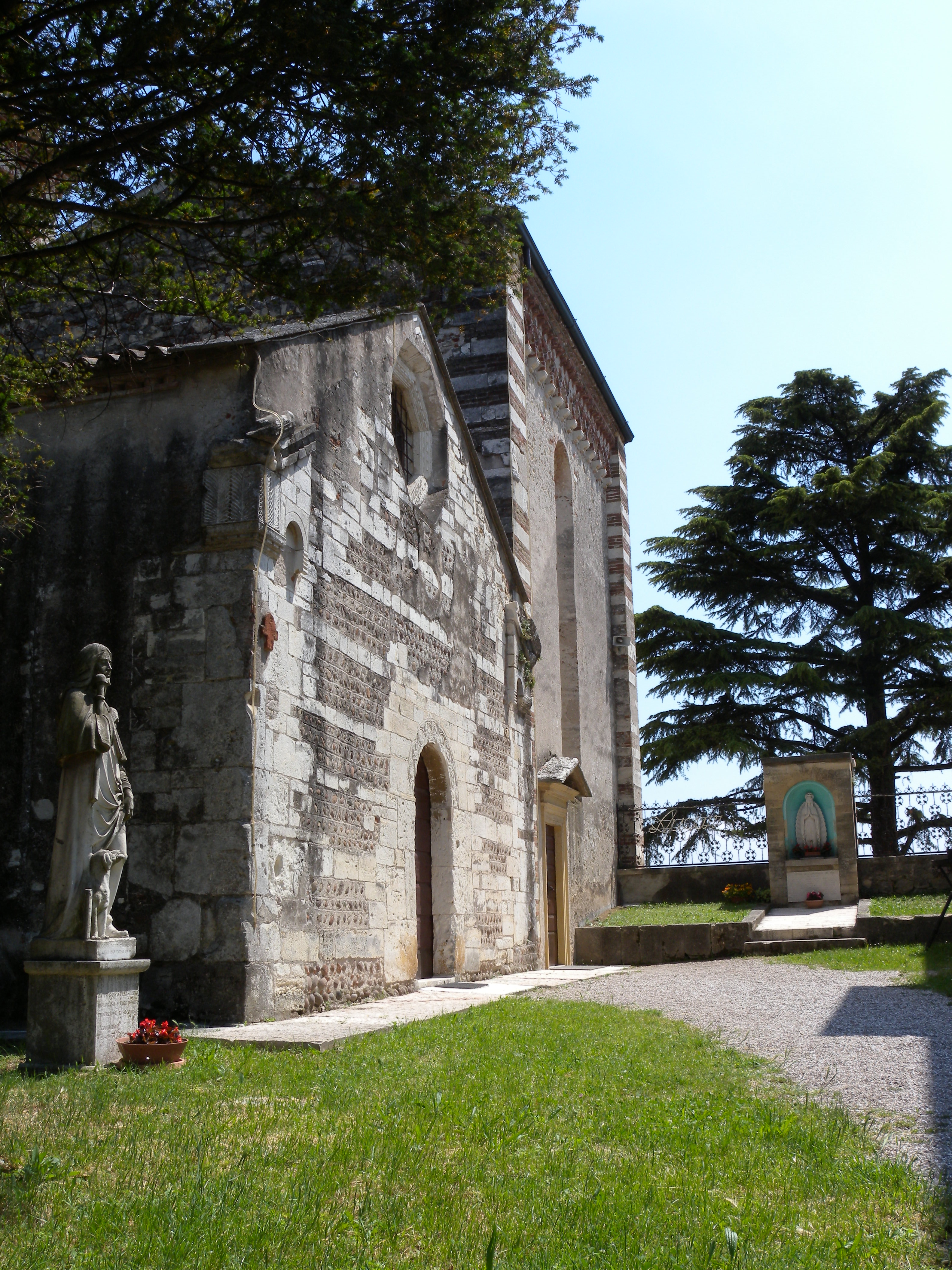 Ripresa delle chiese di San Rocco e San Martino a Corrubbio, frazione di San Pietro in Cariano in provincia di Verona